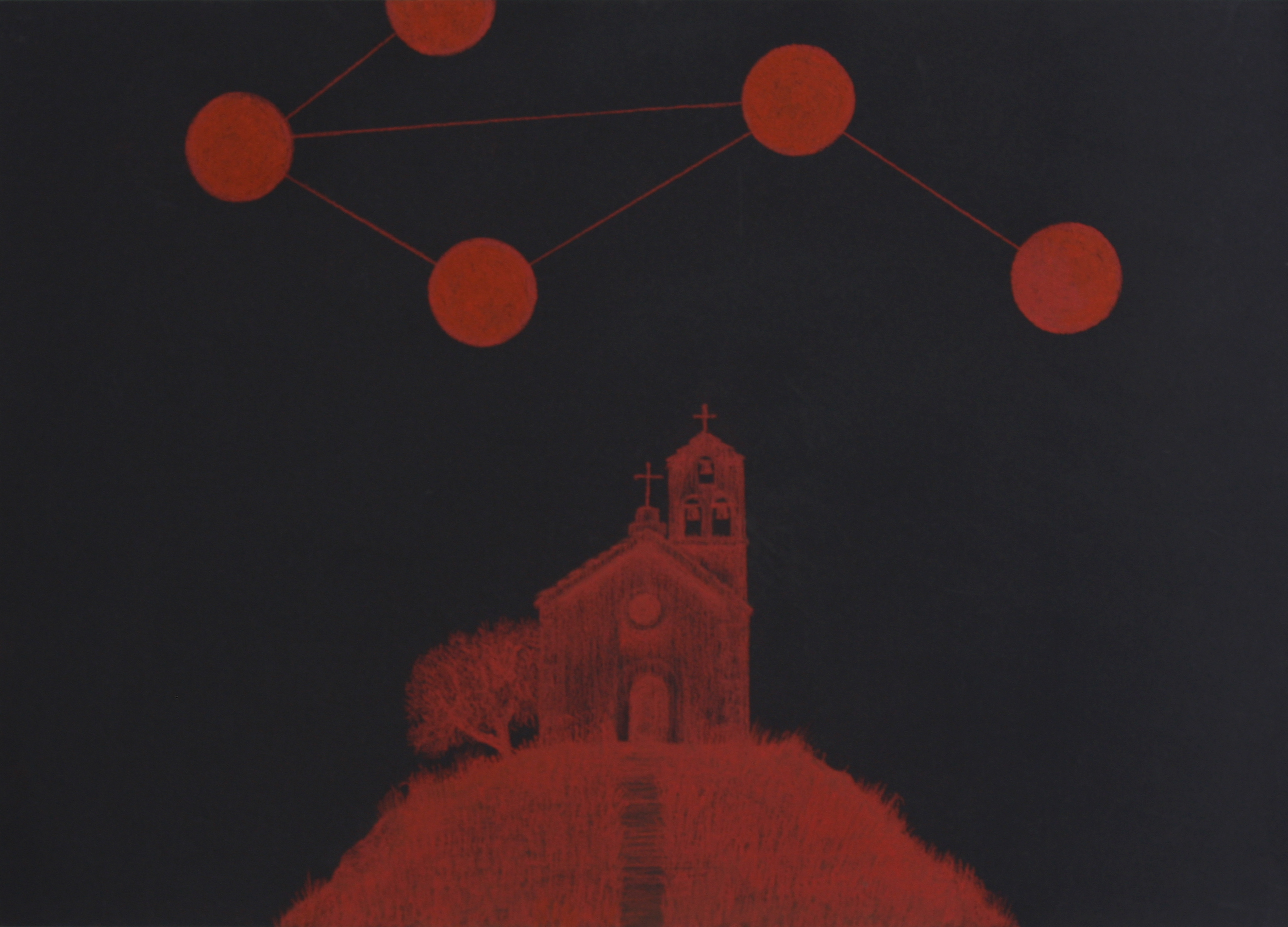 kresba